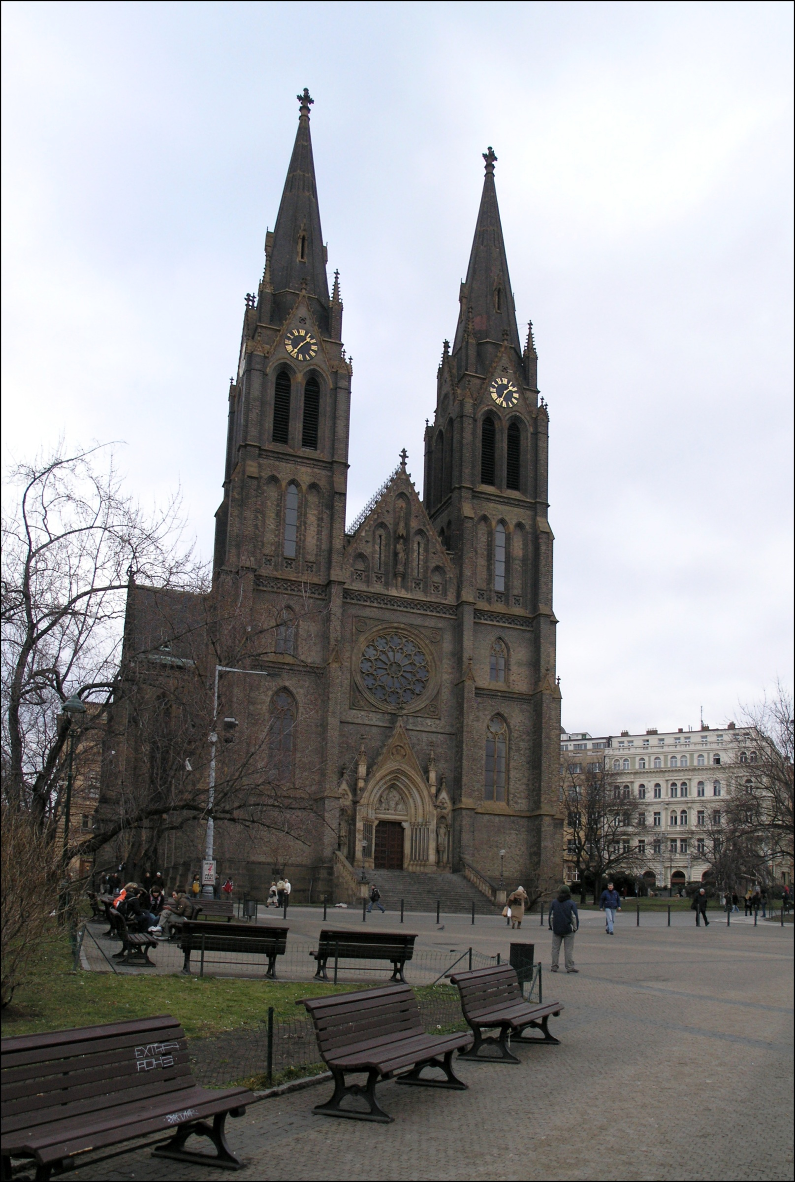 Chrám sv. Ludmily v Praze